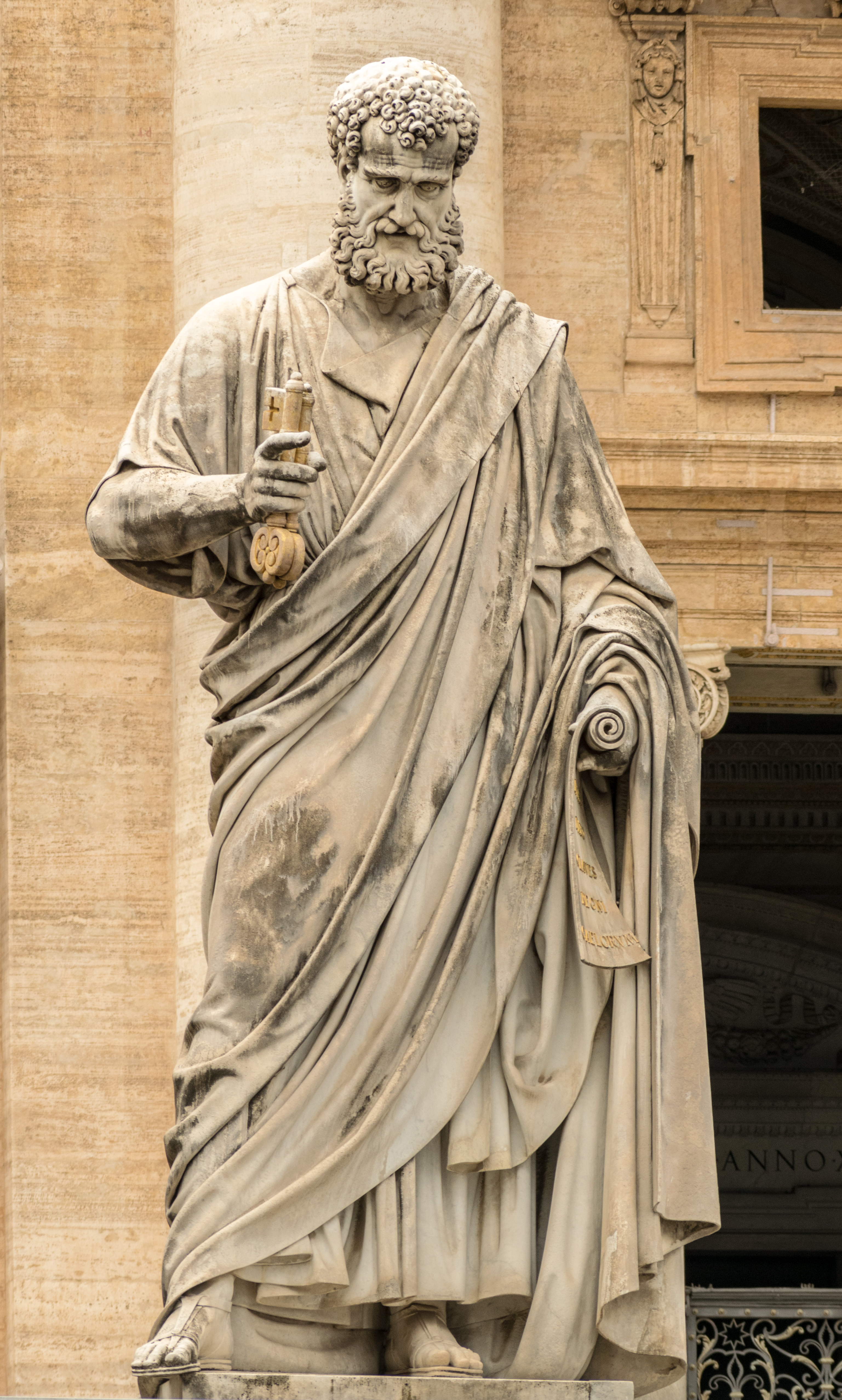 Die Statue des Heiligen Petrus von Giuseppe de Fabris, die 1847 auf Wunsch von Papst Pius IX. auf dem Petersplatz in Rom aufgestellt wurde.